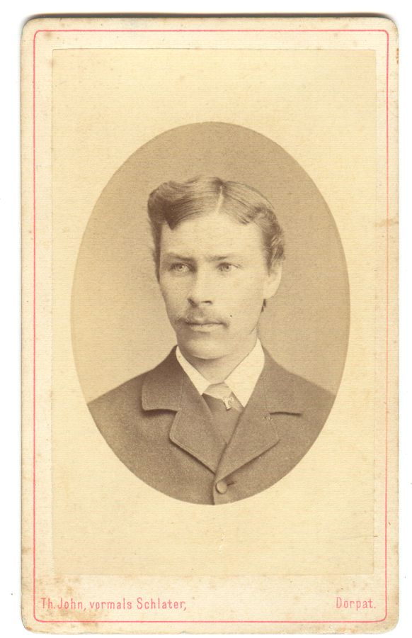 Muuseumikogu Fotokogu Olemus foto Originaal originaal Säilivus rahuldav